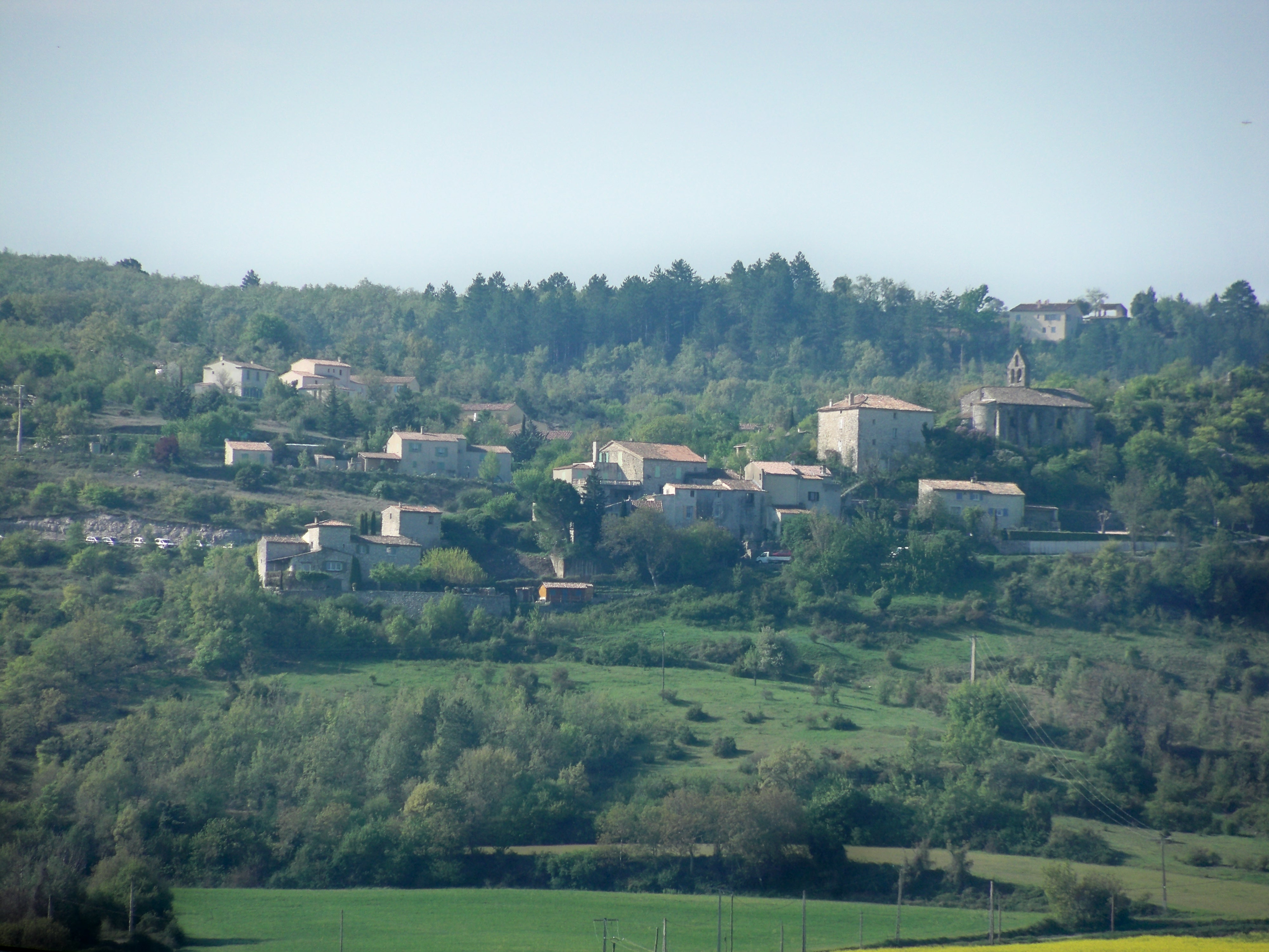 vue générale sur Villemus (04), France